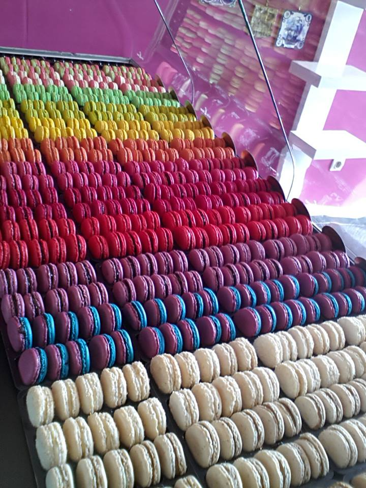 Macaron choco noir, lait et blanc, passionnément chocolat , nutella. Vanille, praliné , amande , noix de coco , café , caramel beurre salé . Fruit des bois , myrtille , framboise , cerise , fraise. Orange , citron yuzu , citron vert , pamplemousse. Pistache , reglisse , pomme , poire . Litchie , mangue , fruit de la passion , mojito.